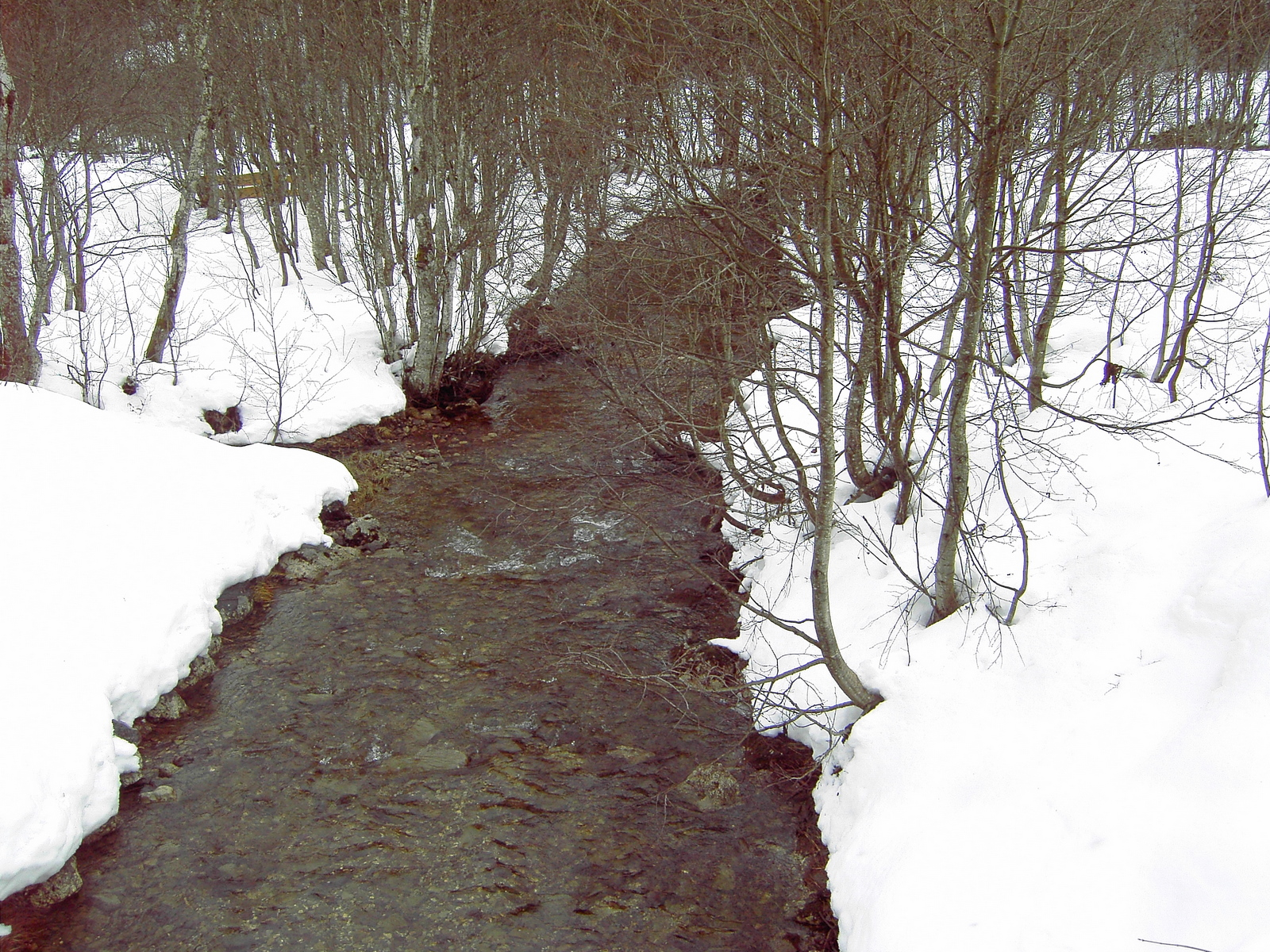 Starzlach bei Rohrmoos